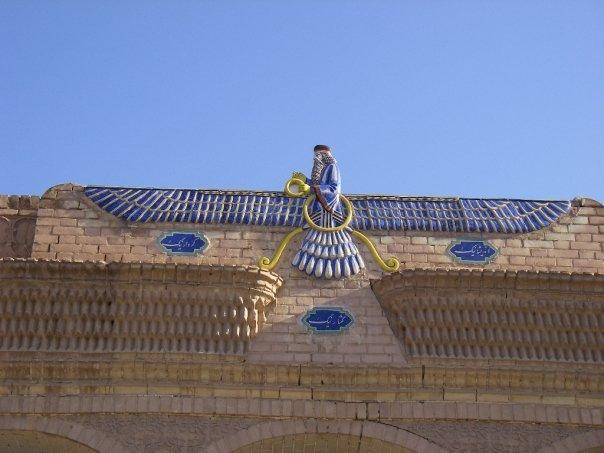 Faravahar sul Tempio del Fuoco, Iran